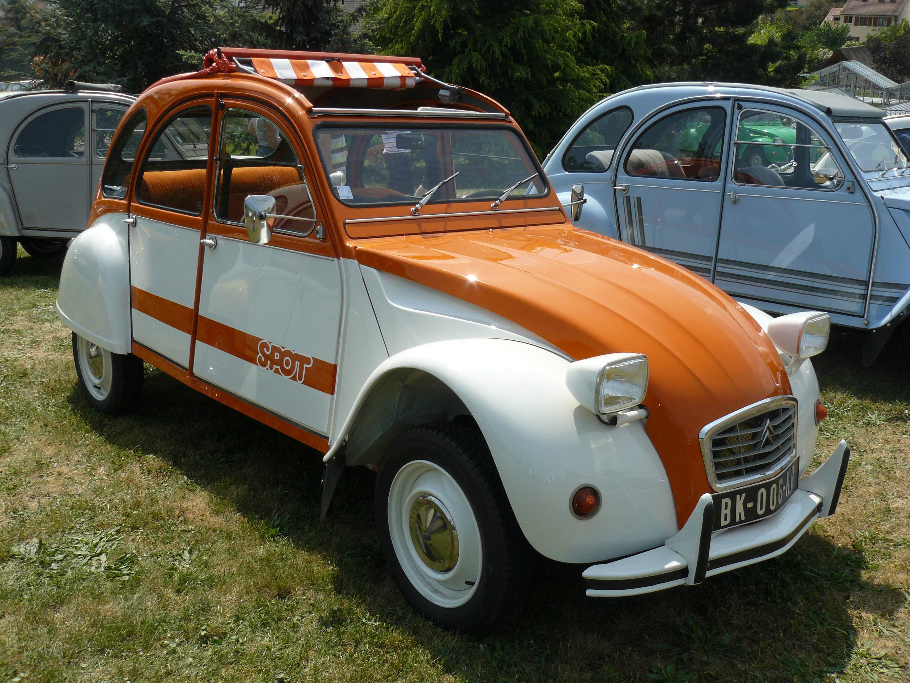 Jardinerie Laplace Mai 11'